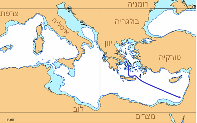 אוניית המעפילים אוניון - מסלול